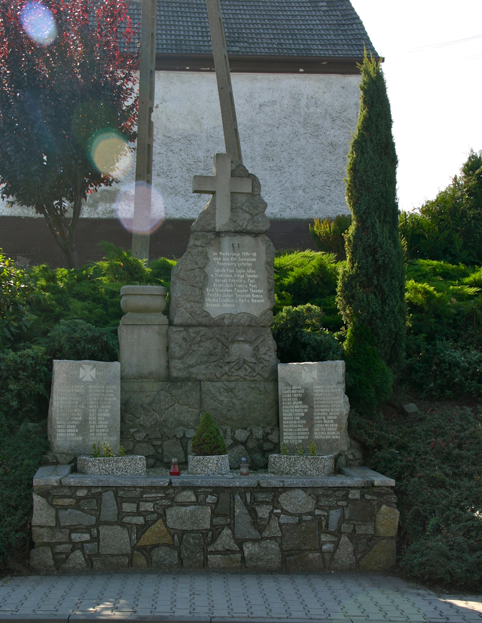 Rostkowice (dodatkowa nazwa w j. niem. Rosenberg) – wieś w Polsce położona w województwie opolskim, w powiecie prudnickim, w gminie Biała.